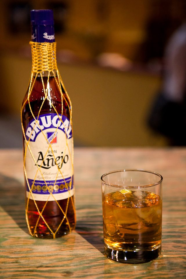 Botella de Brugal